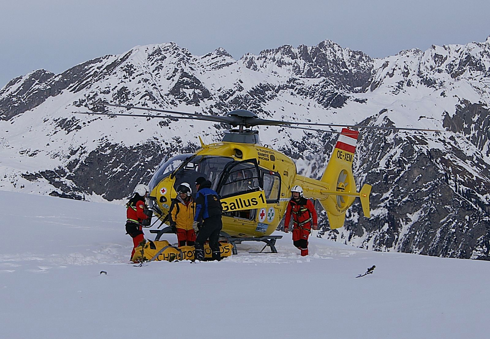 Taubergung mit Bergesack [1] durchgeführt von der Firma Wucher [2] im Bereich Untermurich unterhalb vom Sonnenkopf in Cooperation mit dem ÖAMTC im Skigebiet der Sonnenkopfbahnen in Klösterle, Vorarlberg. “Technische Daten Helicopter”: [3] 9.) Vorbereitung Abtransport .